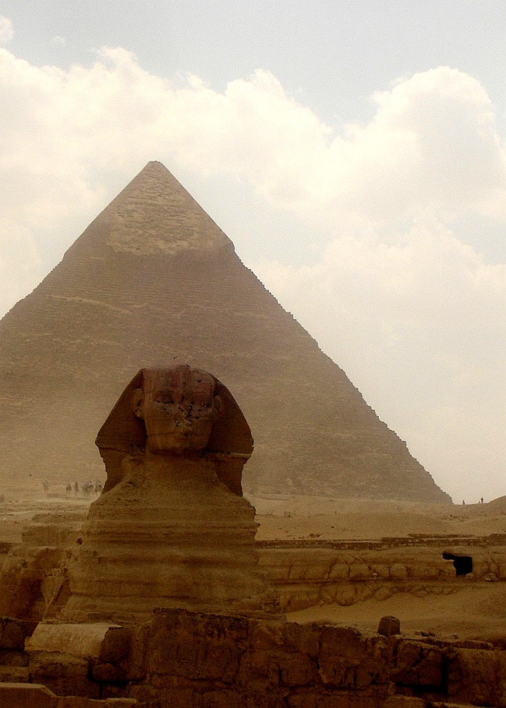 Immagine dall'Egitto - Giza - Sfinge